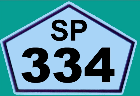 Placa da rodovia SP-334, São Paulo, Brasil